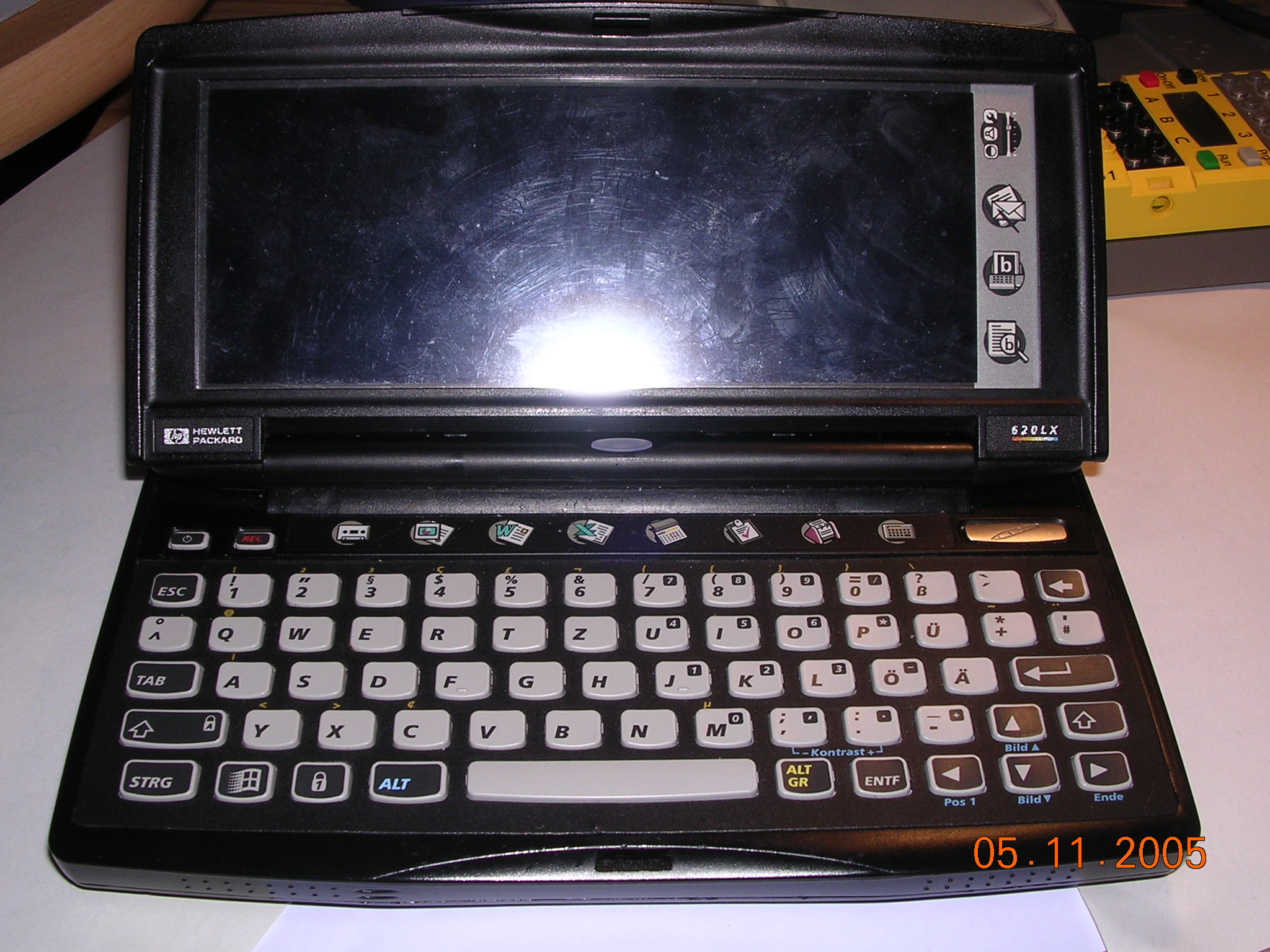 PDA-HP model 620LX